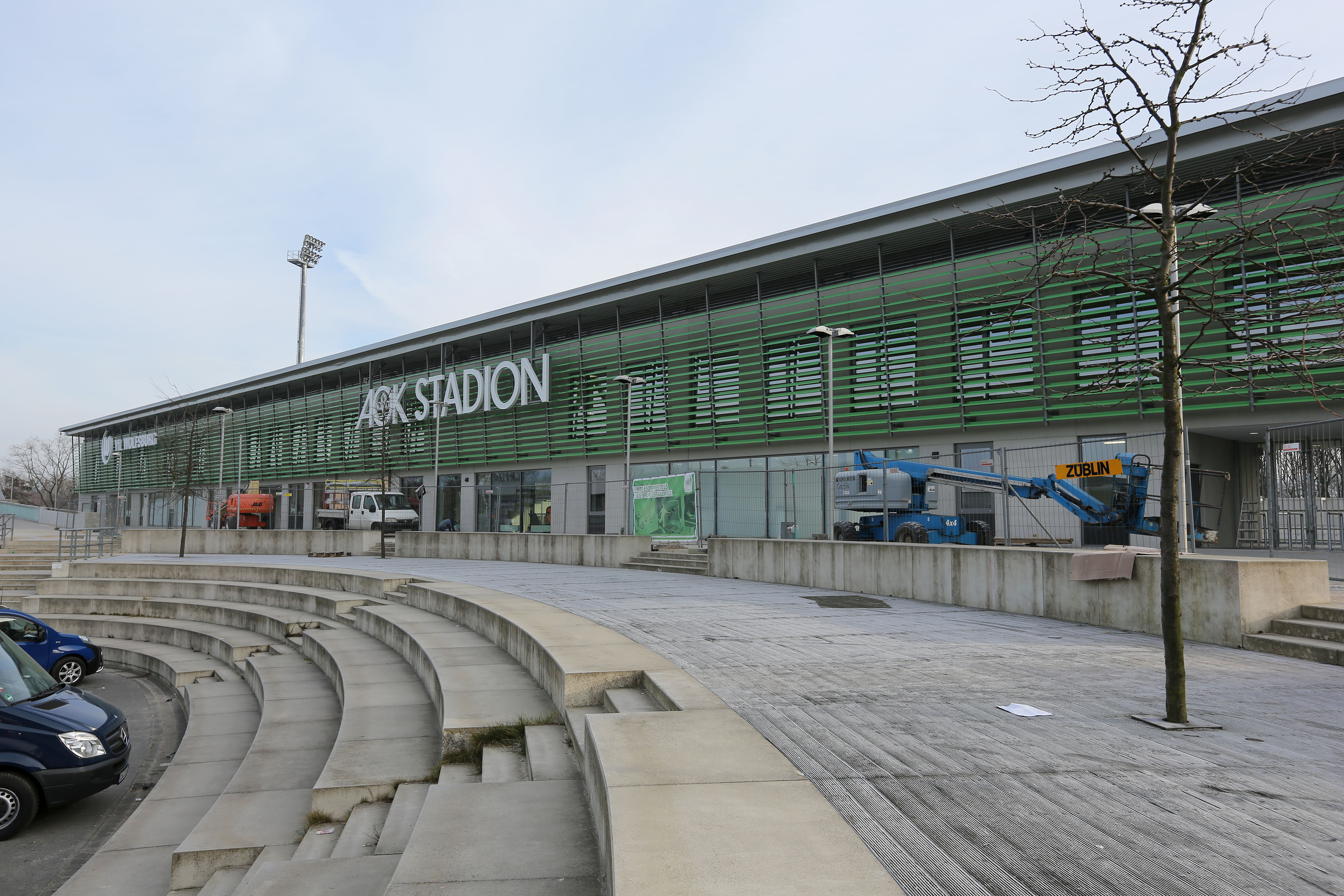 Haupteingang des AOK Stadions